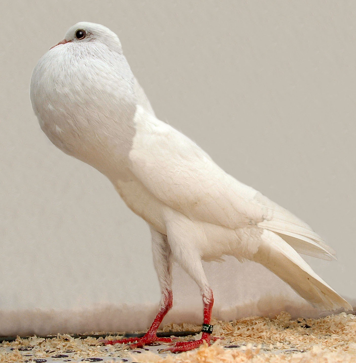 Brunner Pouter photo by jackie brooks/jim gifford